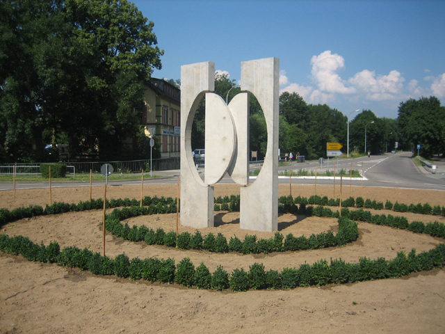 Die Plastik "Große OffenBurg" von CW Loth auf dem Kreisel vor der Hochschule Offenburg. Das Werk ist aus Beton gefertigt.